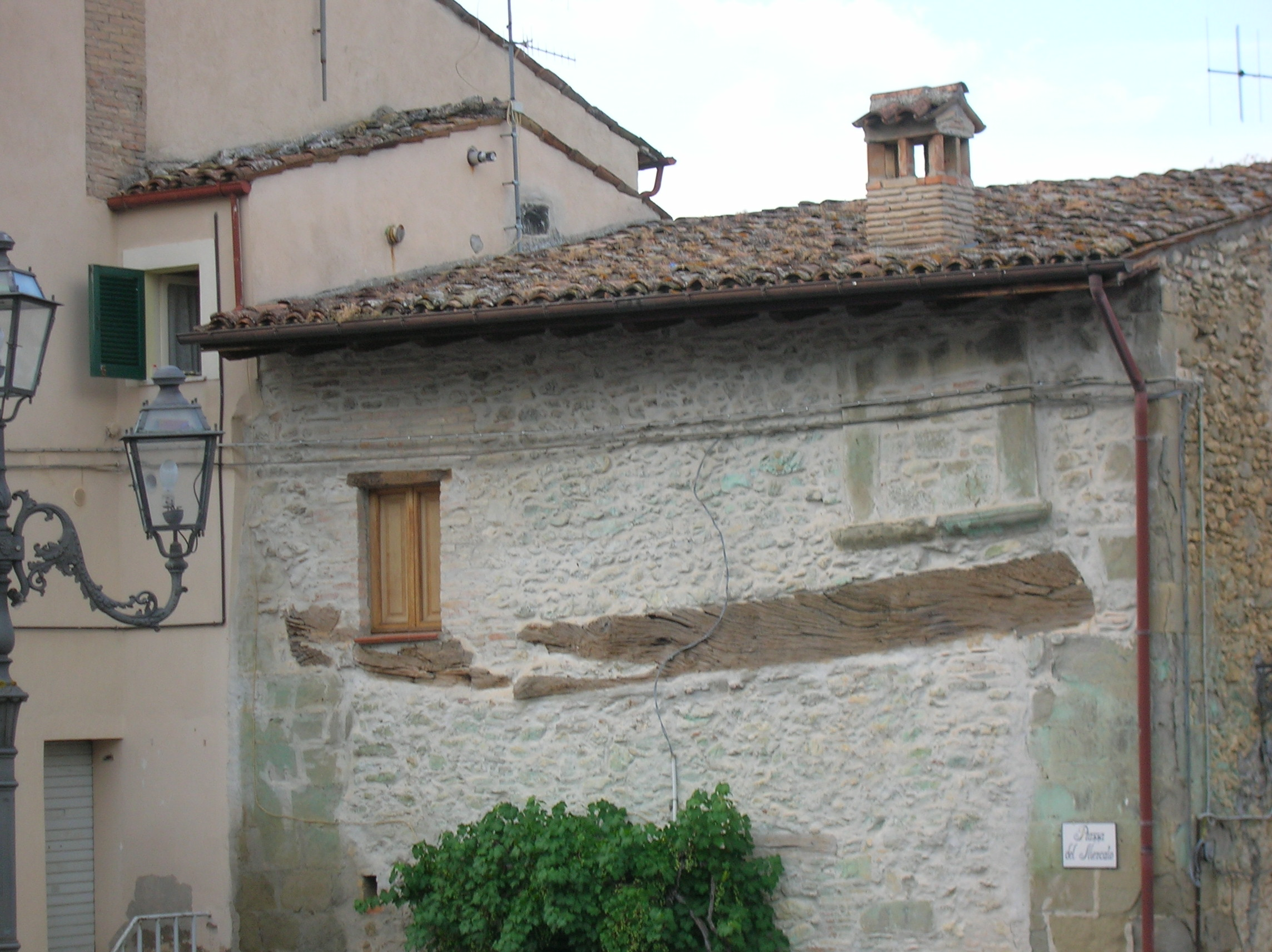 trave incluso nel muro a Tossicia